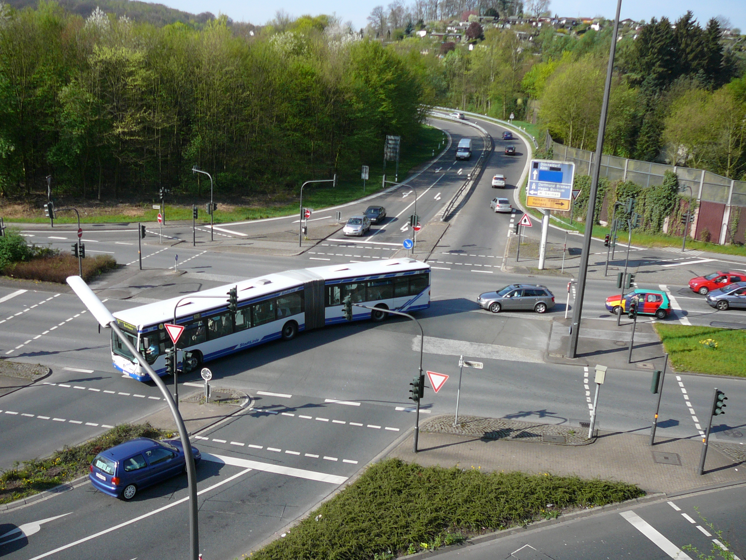 Straßenkreuzung „Briller Kreuz“, Wuppertal